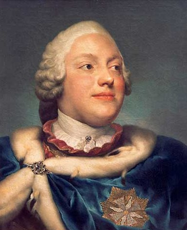 Kurfürst Friedrich Christian von Sachsen (1722-1763)